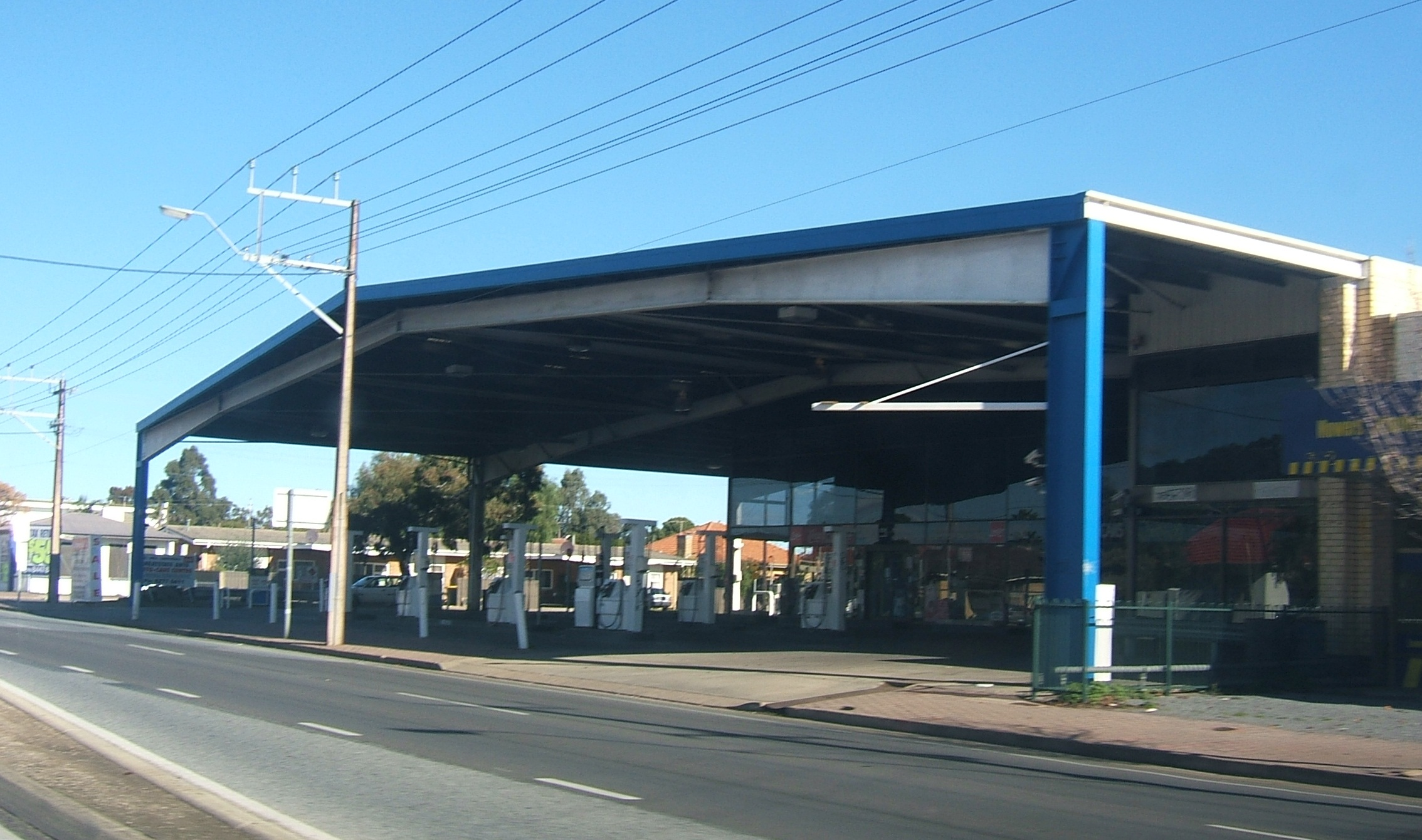 Park Holme, Adelaide